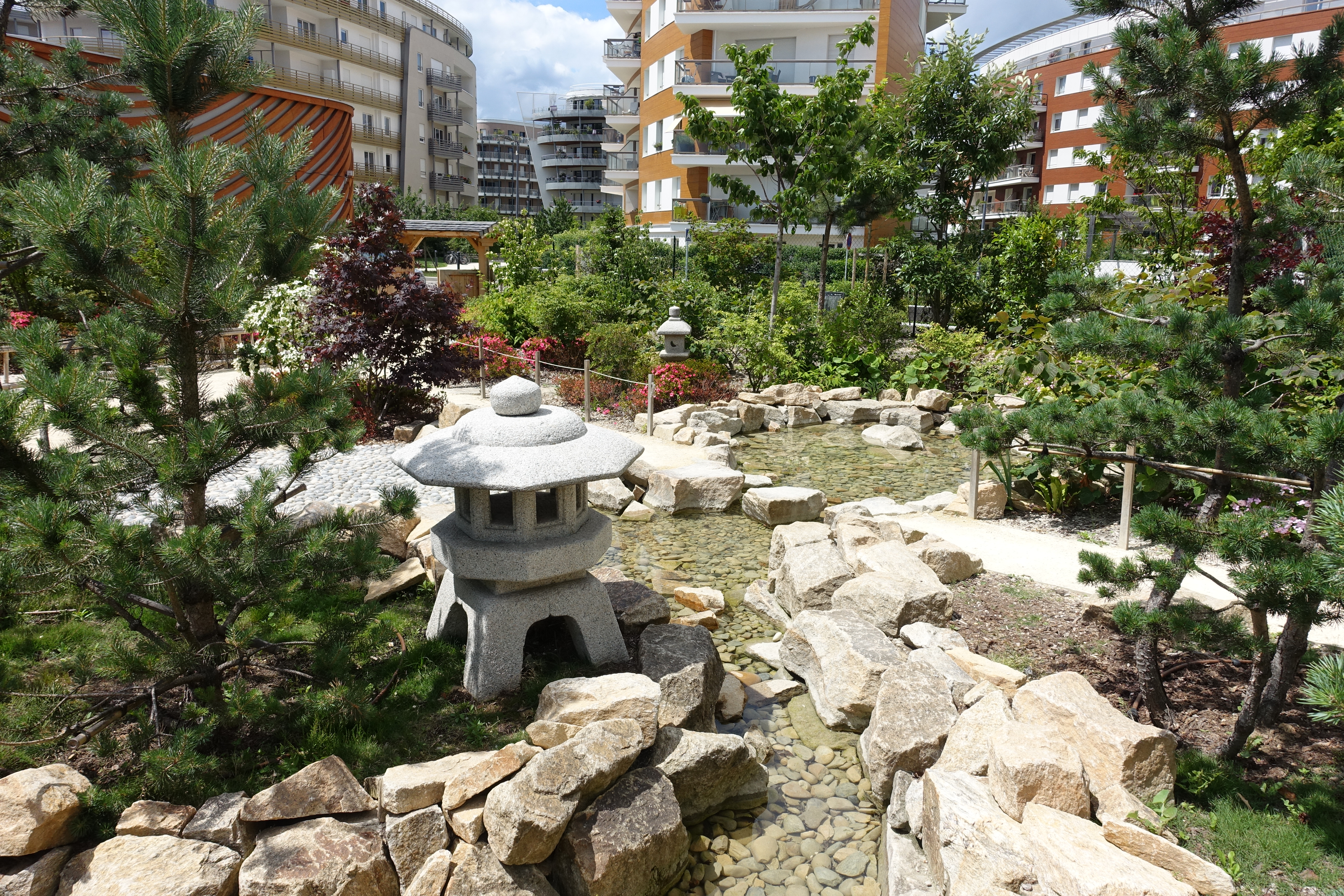 Japanese garden @ Fort d'Issy-les-Moulineaux